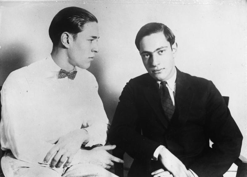 Zu dem sensationellen Mordprozess der amerik. Millionärssöhne Richard Loeb und Nathan Leopold in Chicago ! Richard Loeb (rechts) und Nathan Leopold (links) die Mörder des 14 jährigen Robert Franks, welche zum Tode durch den Strang verurteilt wurden. (Personen falsch zugeordnet!)